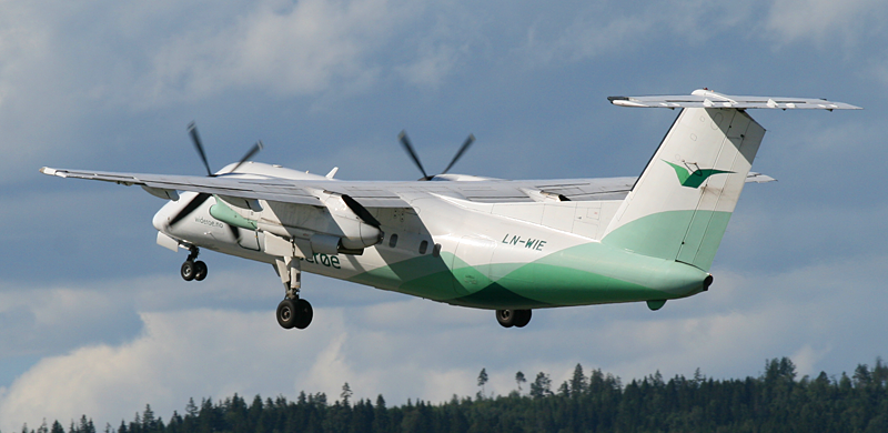 Widerøe på Værnes